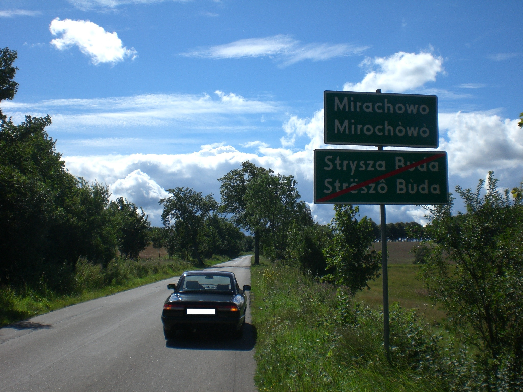 Mirachowo